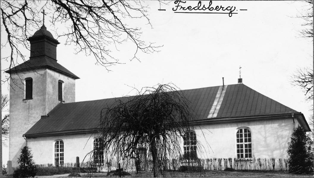 Kyrkan från söder.